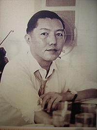 中文（香港）: 著名粵劇劇作家唐滌生。